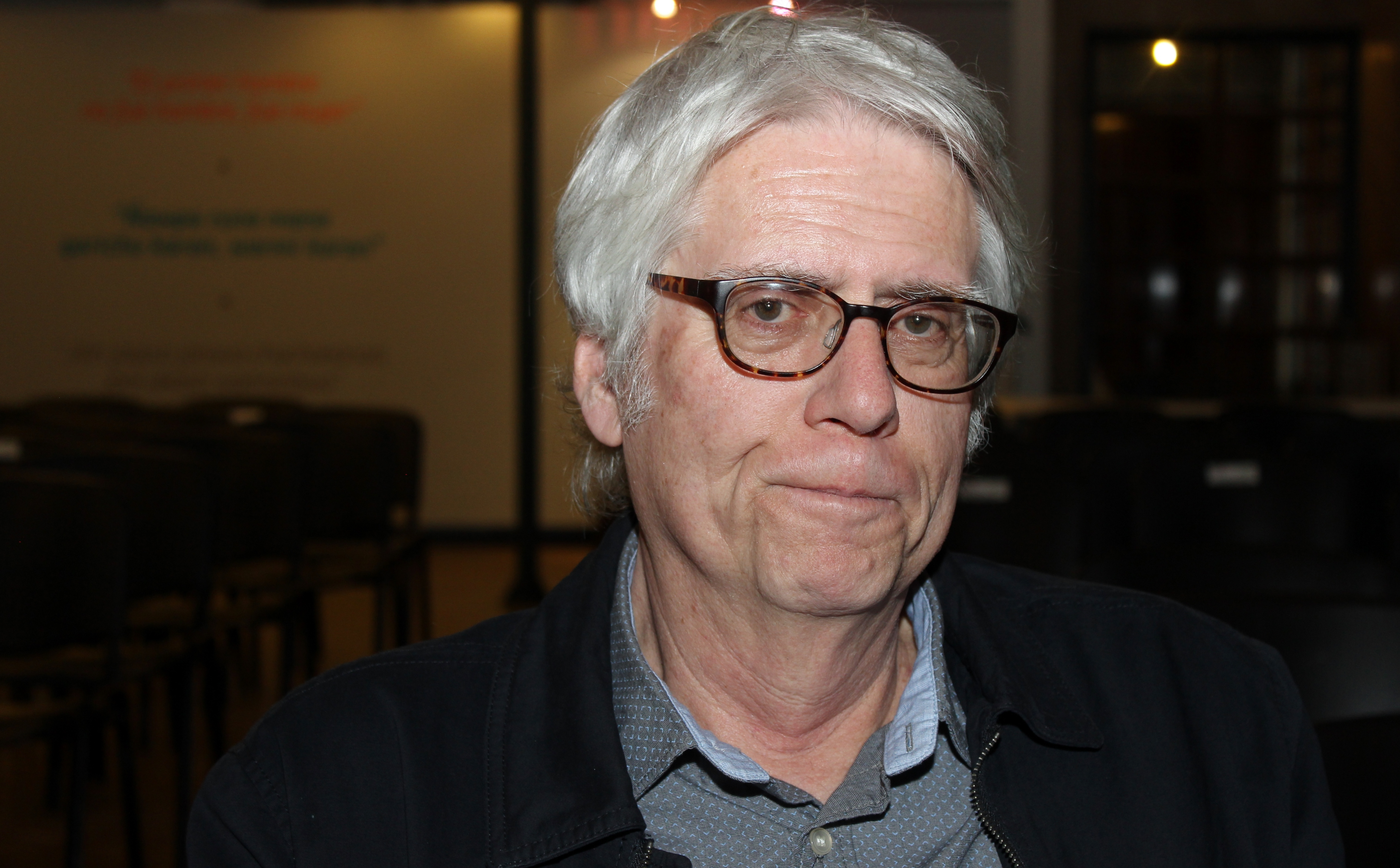 El poeta peruano Mario Montalbetti en la Feria Internacional del Libro de Santiago 2018.